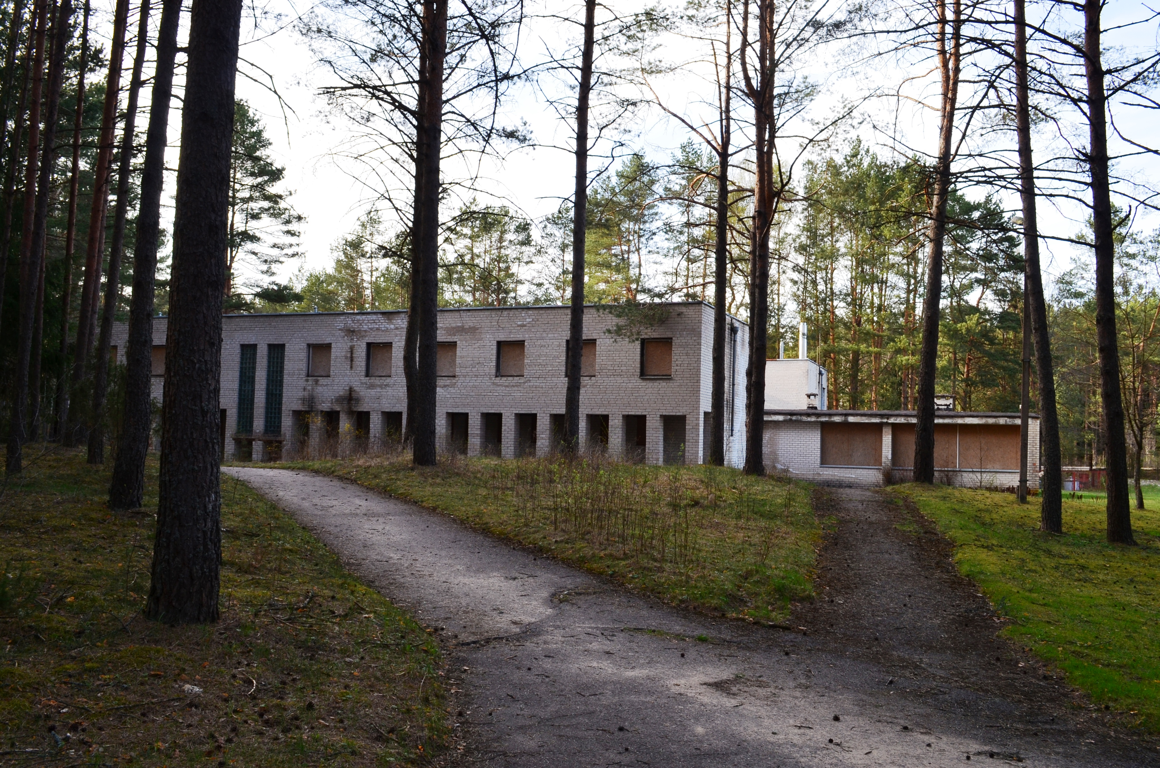 Buvę pionierių poilsio namai, Balžio Šilas, Vilnius